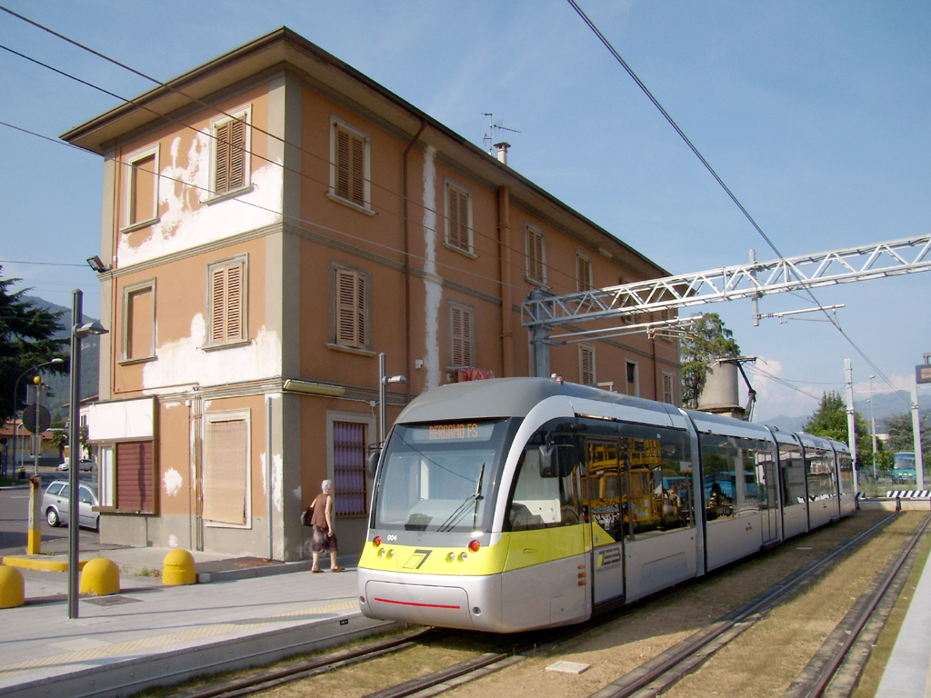 Tranvia Bergamo-Albino al capolinea di Albino Centro